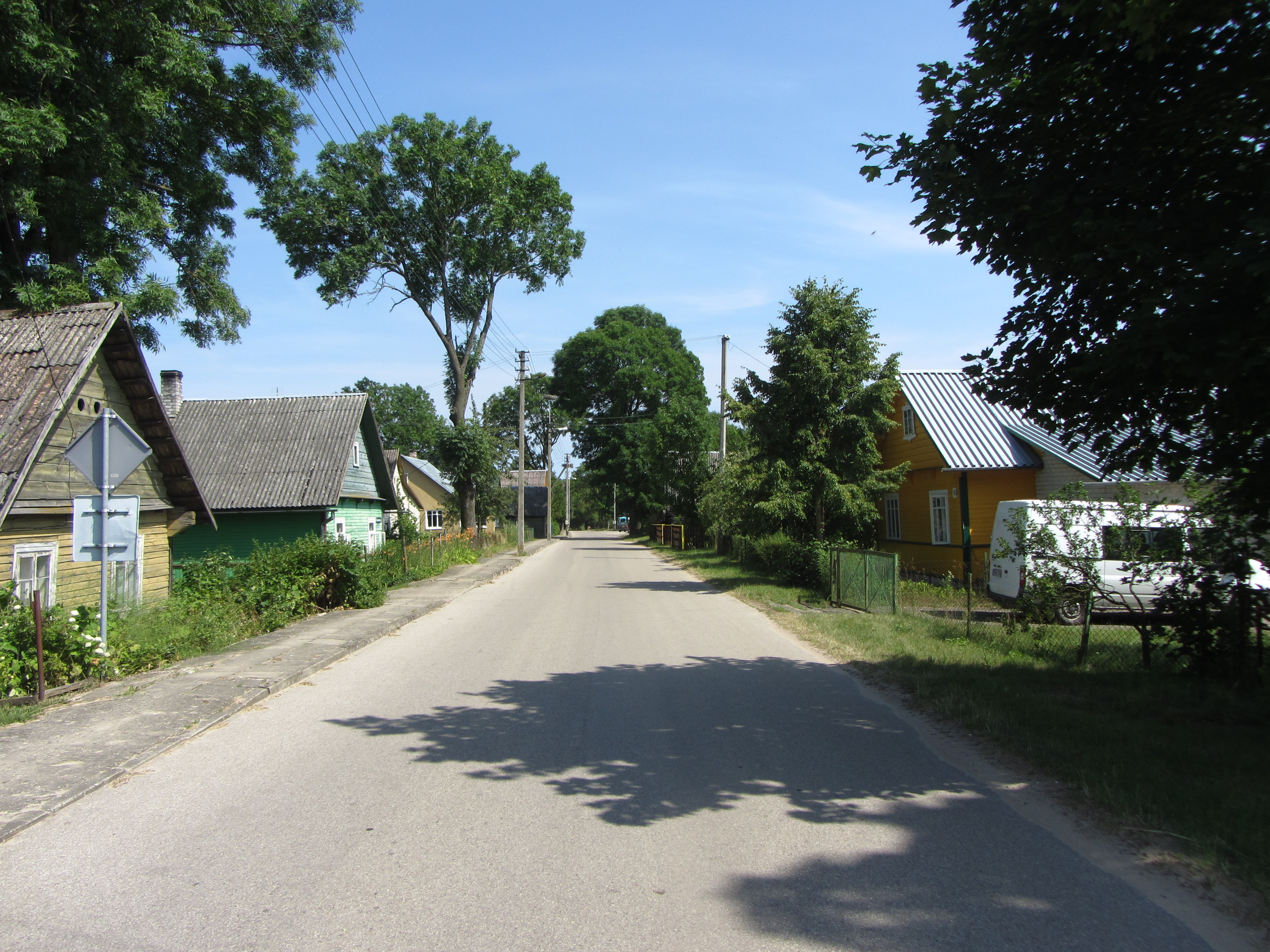 Švendubrė 66444, Lithuania